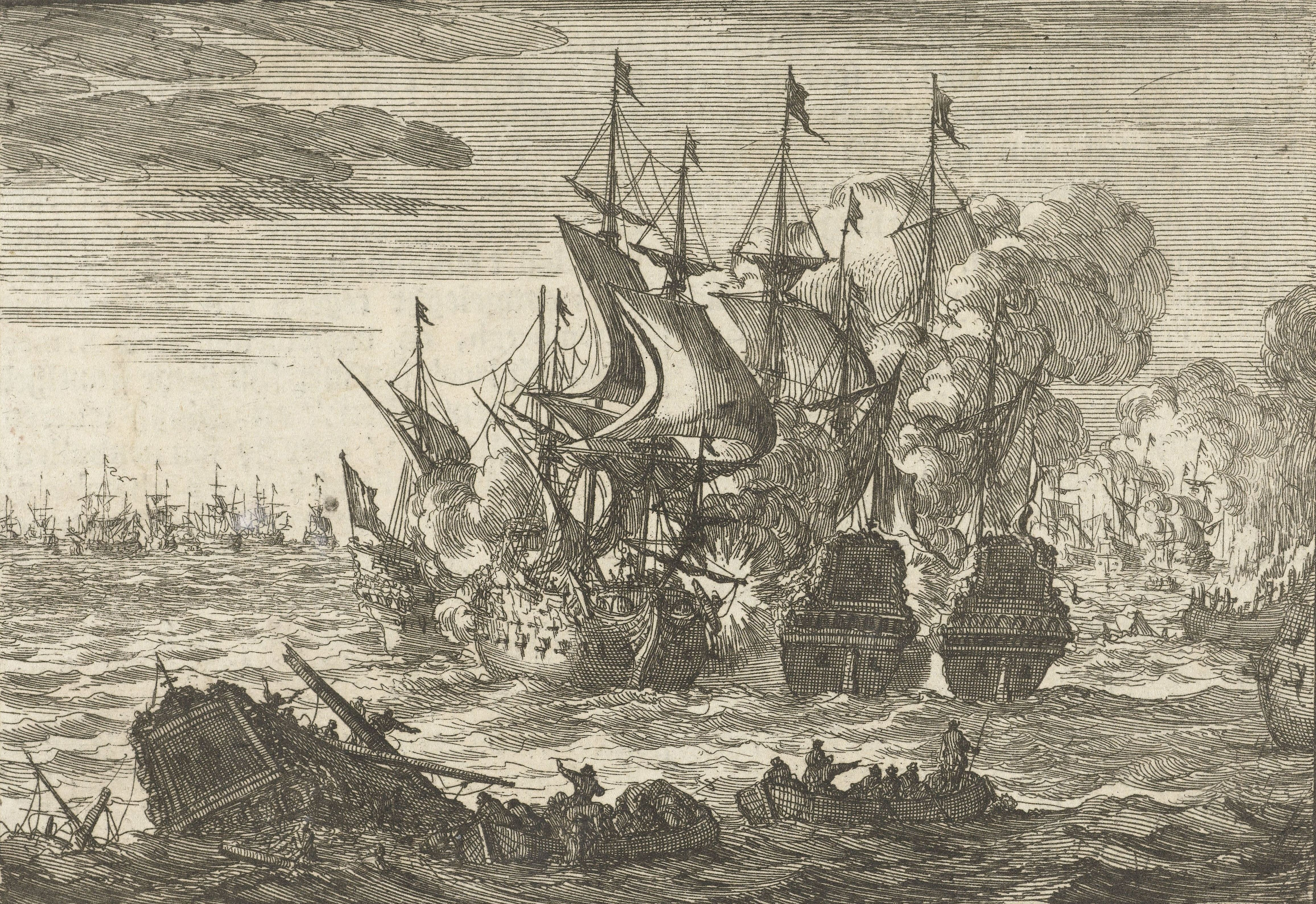 IdentificatieTitel(s): De slag bij Beachy Head, 1690Objecttype: prent historieprent boekillustratie Objectnummer: RP-P-OB-82.713Catalogusreferentie: FMH 2799-COpmerking: (toegevoegd nummer RPK)Van Eeghen 2162Omschrijving: Zeeslag bij Beachy Head (Béveziers) Waar: bij een gecombineerd Engelse en Nederlandse vloot verslagen wordt door de Fransen, 10 juli 1690. Bedrukt op achterzijde met tekst in het Nederlands.VervaardigingVervaardiger: prentmaker: Jan LuykenPlaats vervaardiging: Noordelijke NederlandenDatering: 1696 - 1700Fysieke kenmerken: etsMateriaal: papier Techniek: etsenAfmetingen: plaatrand: h 111 mm × b 156 mmToelichtingIllustratie afkomstig uit: J.L. Gottfried, Historische Kronyck en Omstandigh vervolg door S. de Vries, Pieter van der Aa, Leiden 1698-1700, 3 delen. Niet in Frederik Muller; door het RPK toegevoegd nummer.OnderwerpWat: battle (+ naval force)Zeeslag bij Beachy HeadWanneer: 1690-07-10 - 1690-07-10Verwerving en rechtenVerwerving: onbekendCopyright: Publiek domein